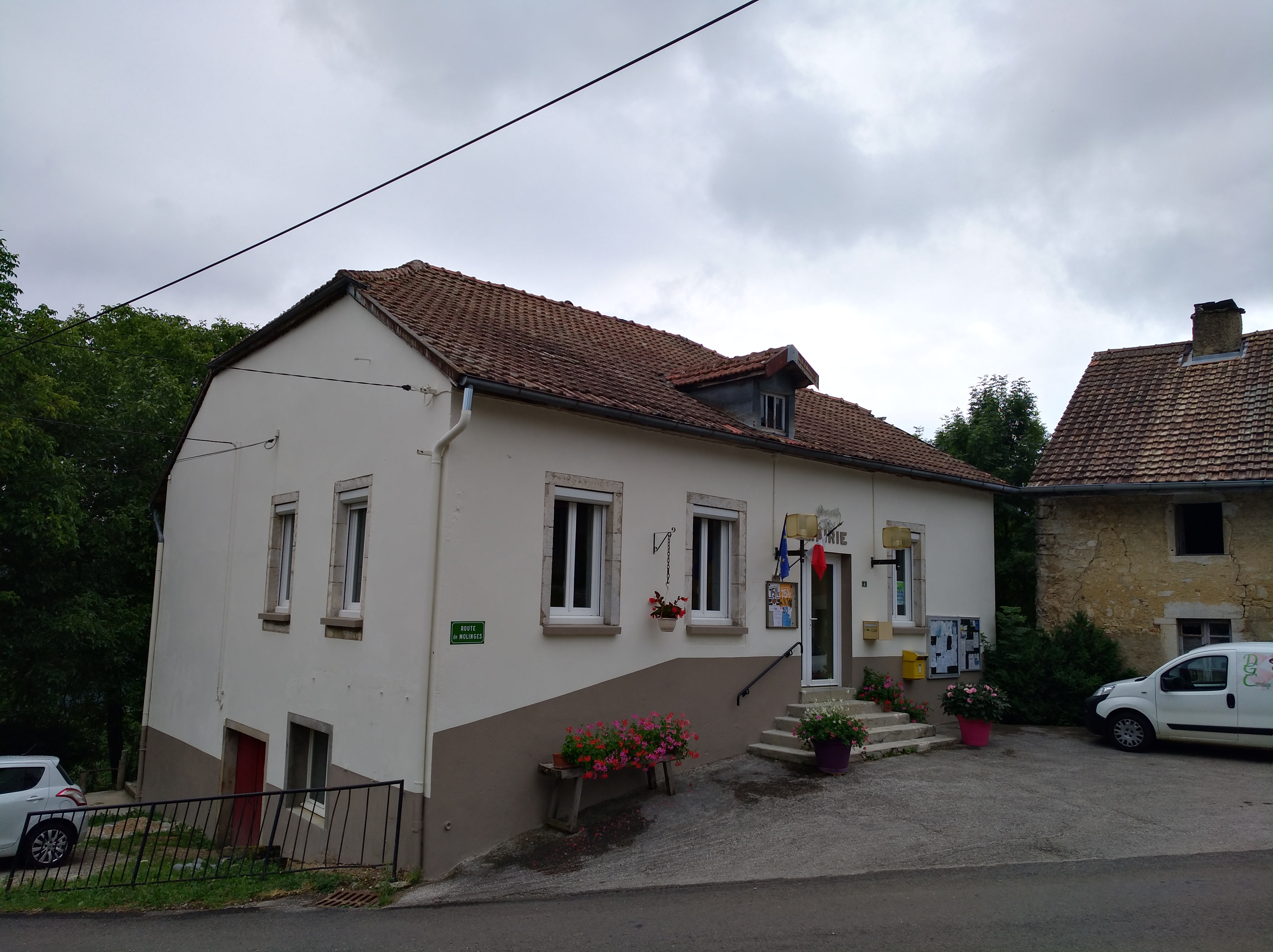 Mairie de Rogna (Jura, France).